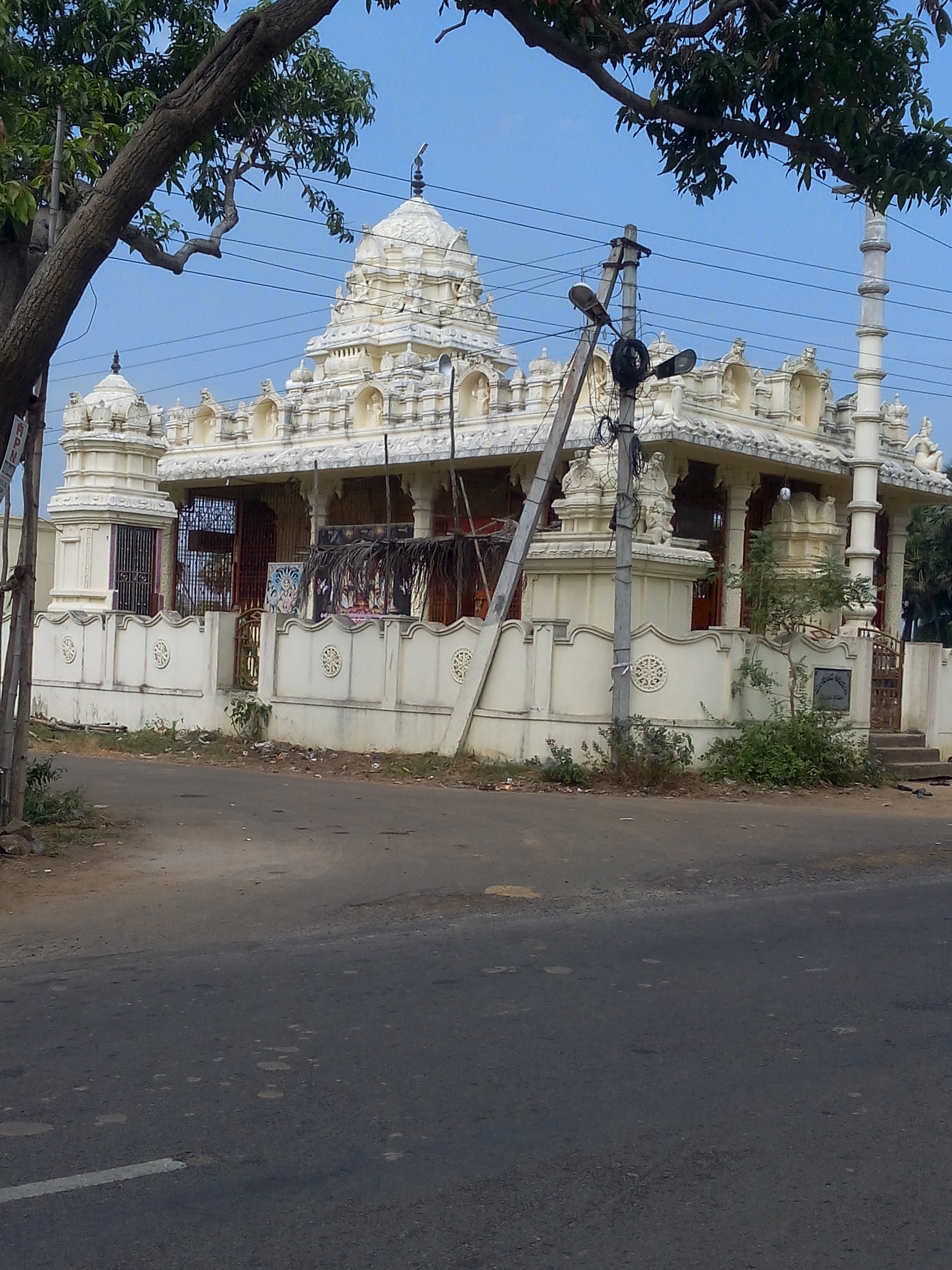 వంజంగి గ్రామ కూడలి వద్ద వెంకటేశ్వర దేవాలయం, ఆమదాలవలస మండలం